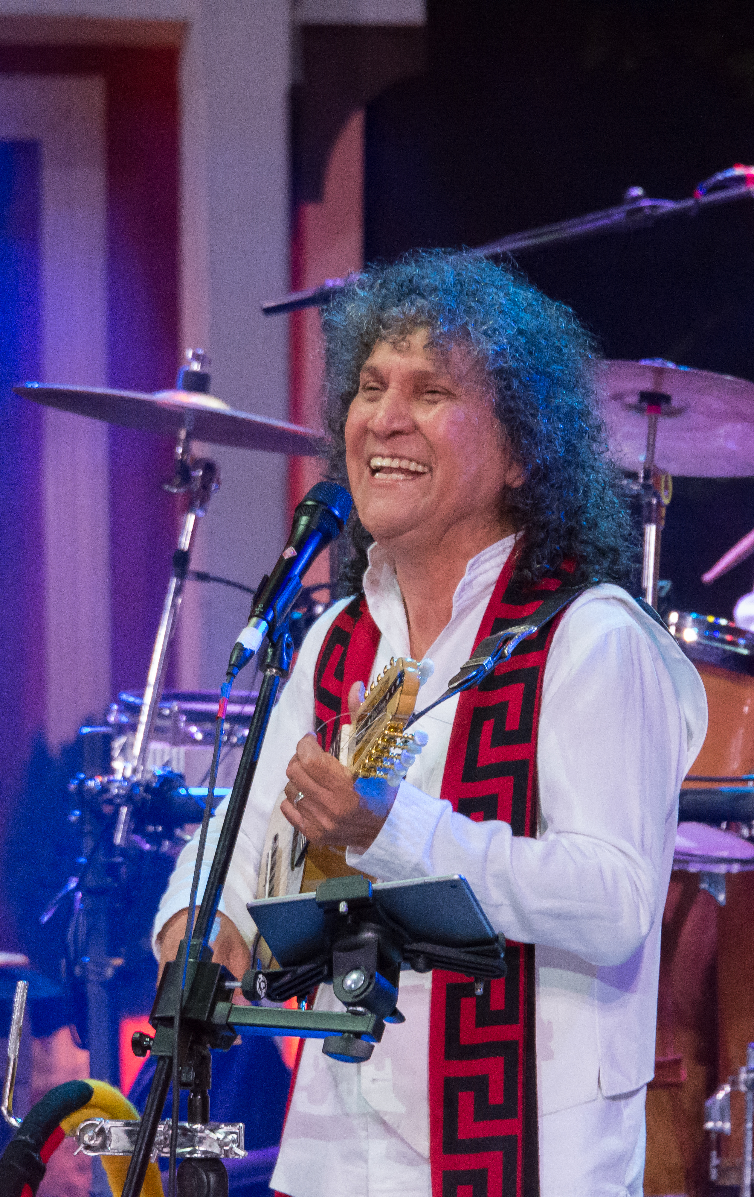 Roberto Márquez, Festival del Huaso de Olmué 2019, Olmué, Región de Valparaíso, Chile.